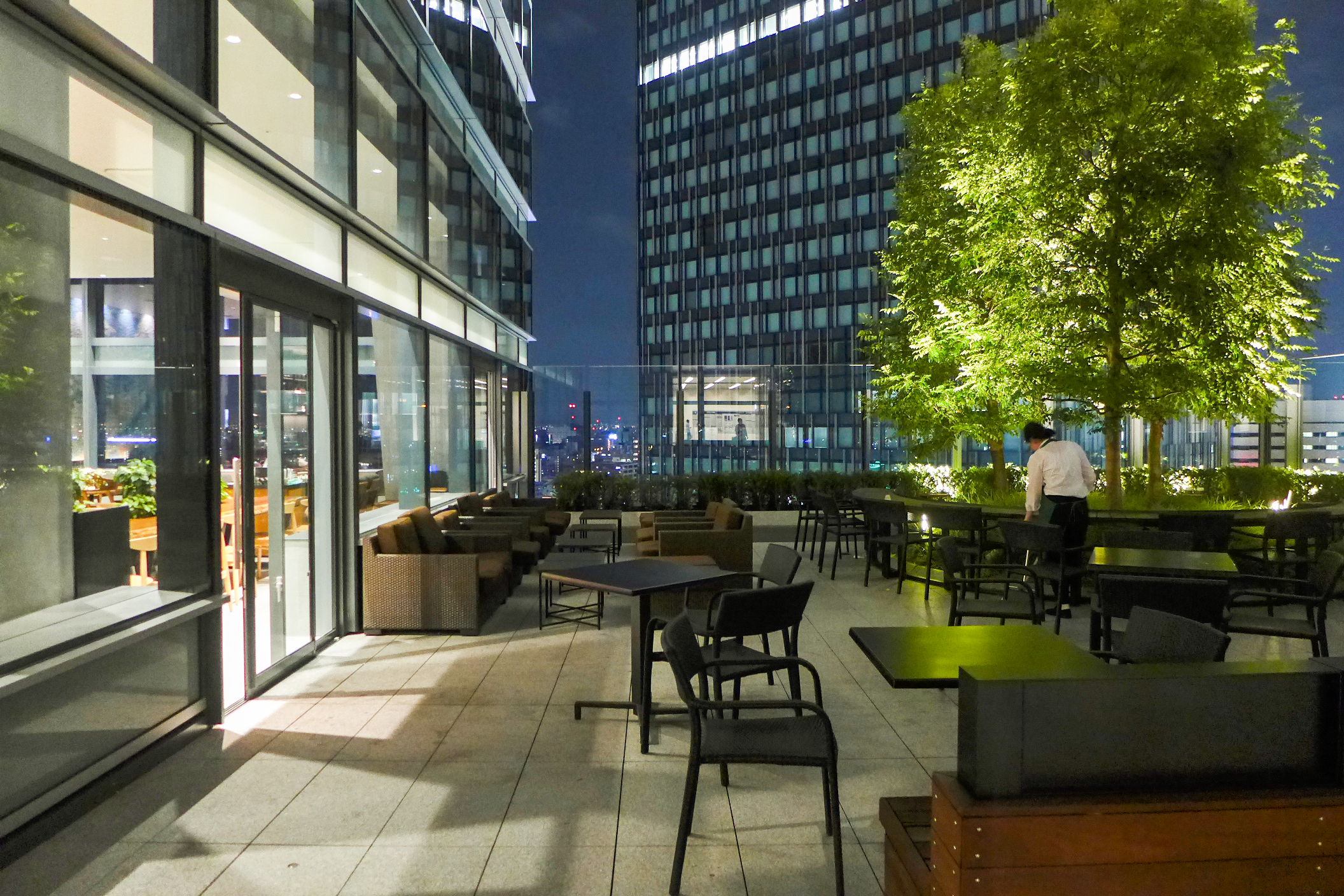 JR Gate Tower Level 15 Starbucks